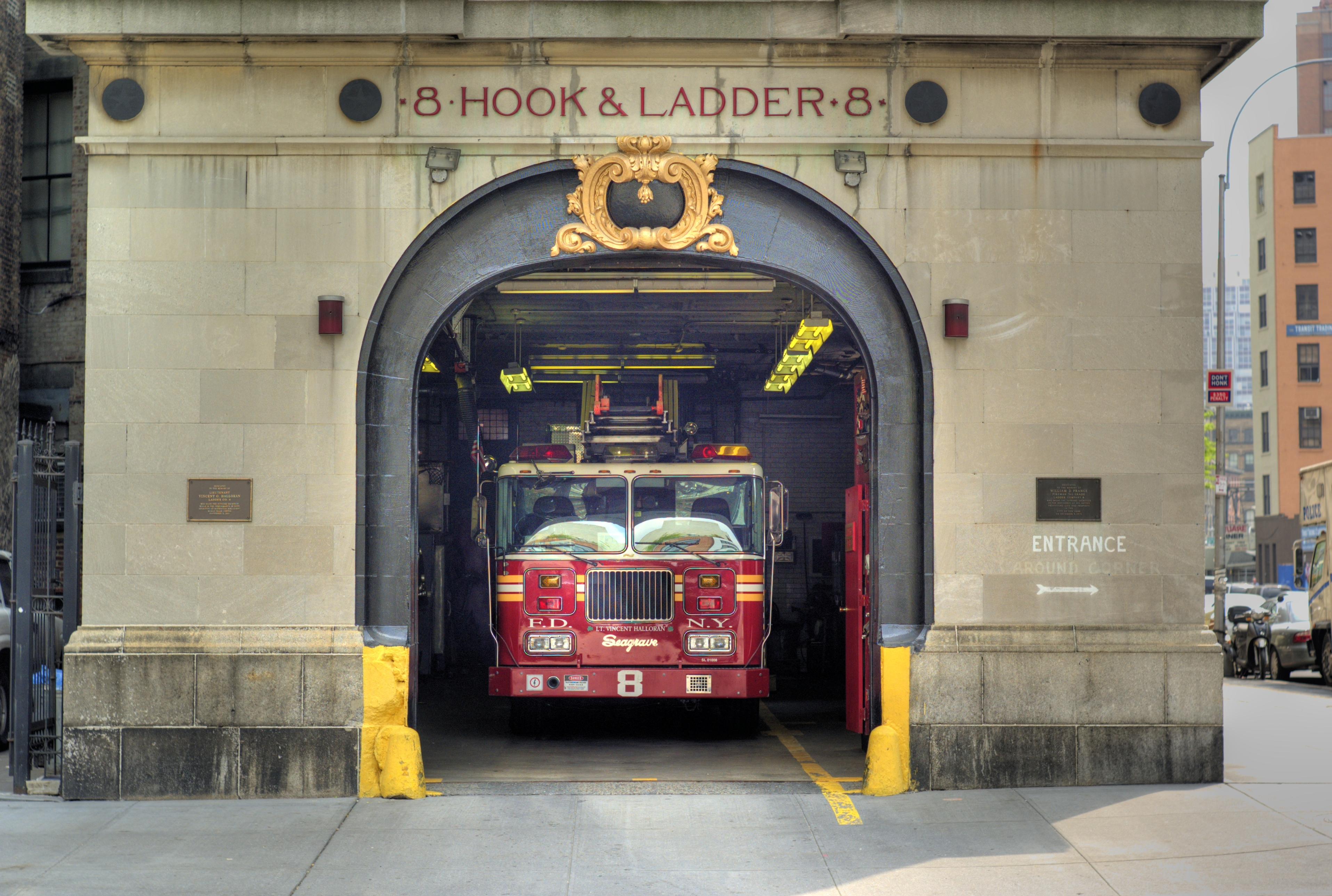 Drehleiter Nr. 8 New York